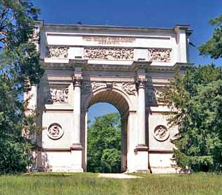 Letohrádek Rendezvous